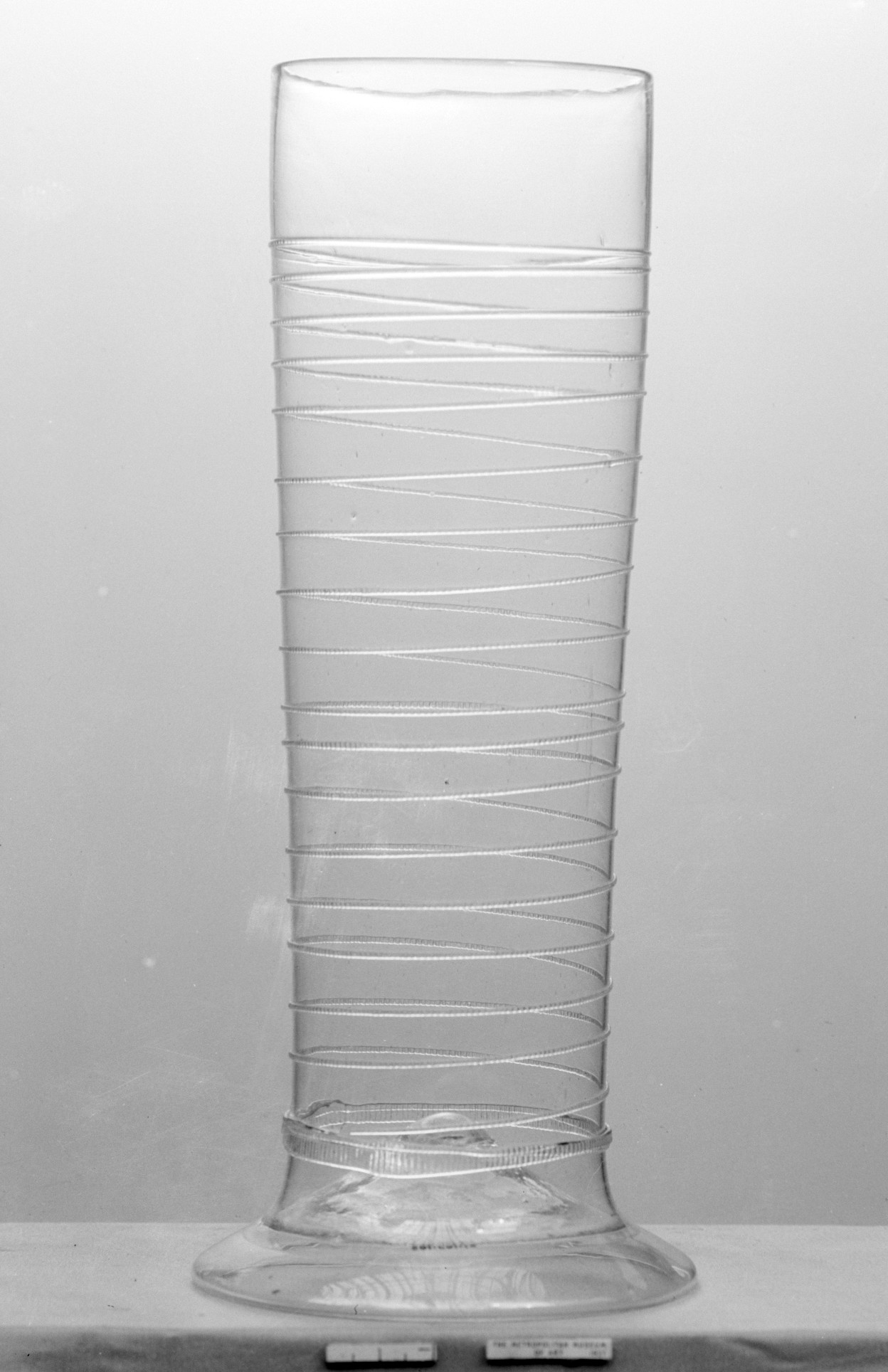 German; Beaker (Passglas); Glass